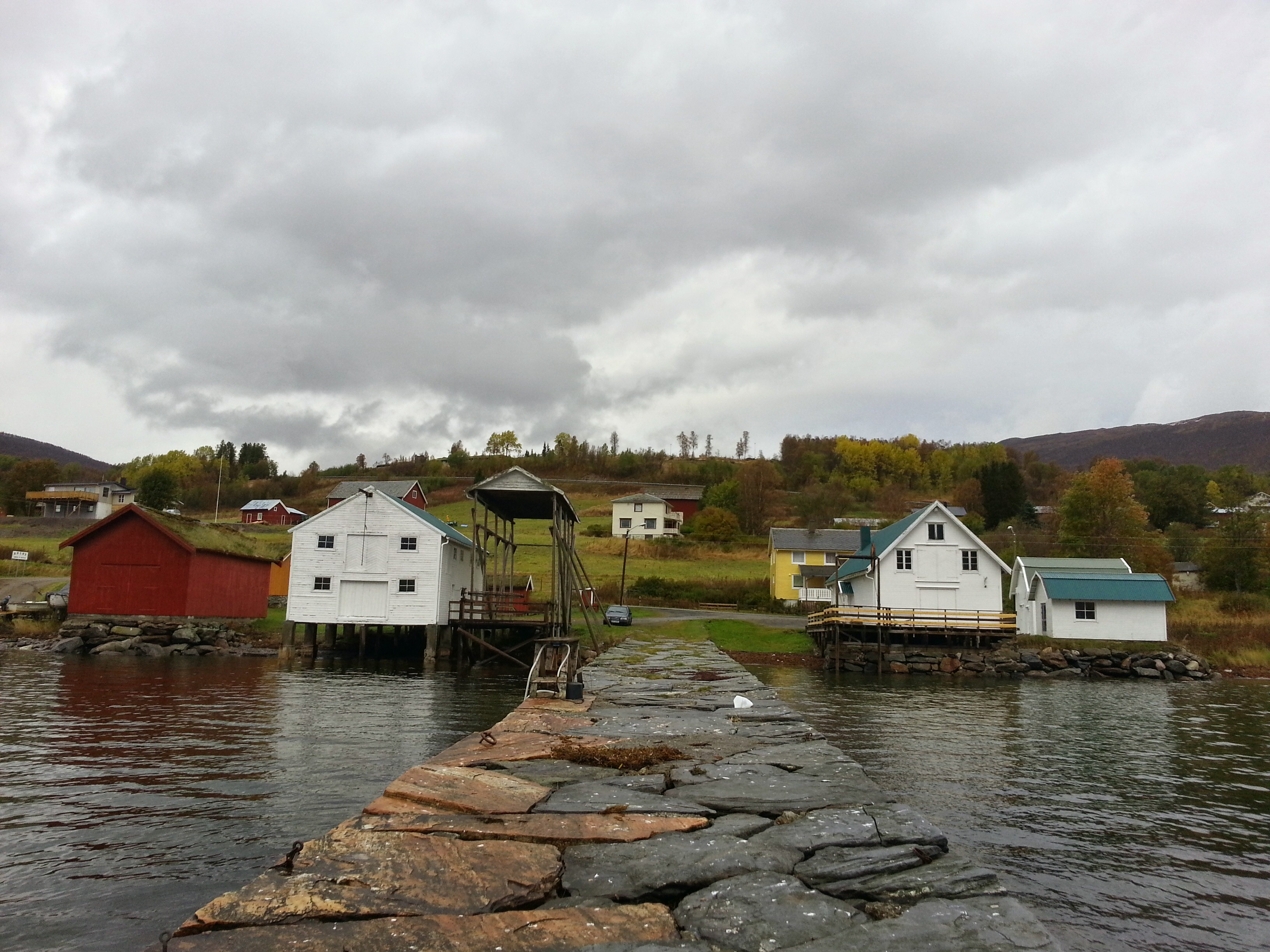 Krambuvika Bygdemuseum sett fra moloen.